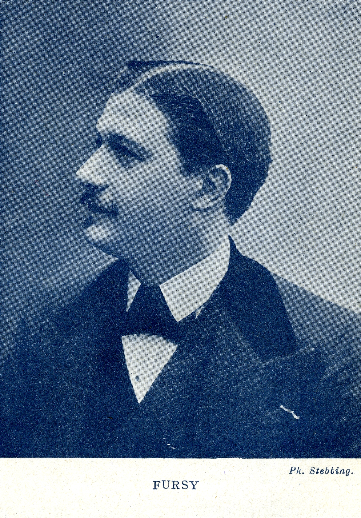 cf